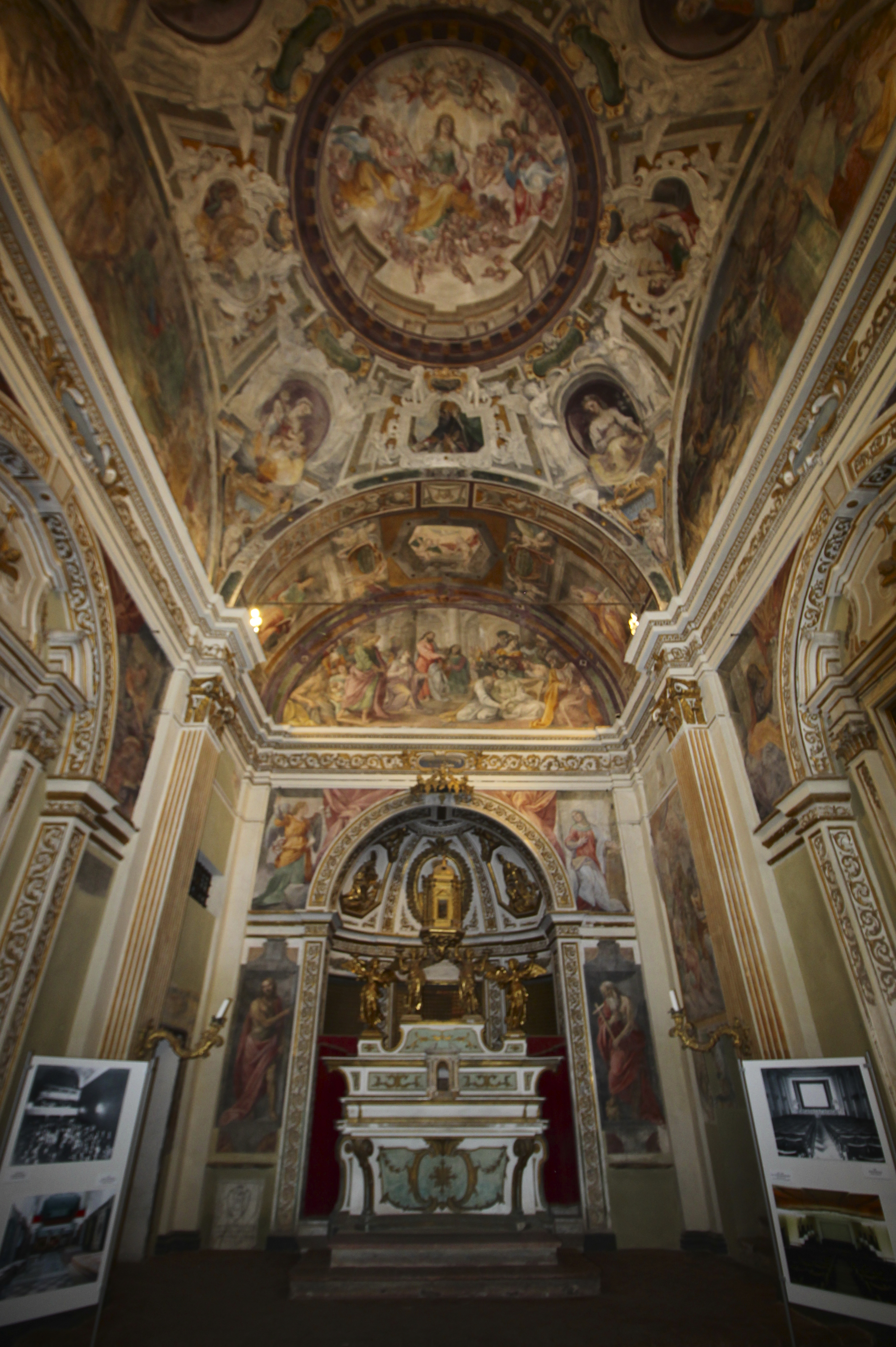 Interior of the former Roman Catholic convent Santa Marta, Via San Marco, Siena, Tuscany, Italy